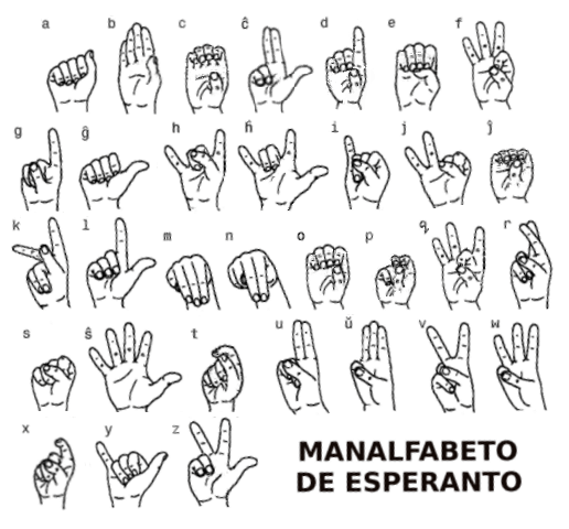 Internacia mana alfabeto de Esperanto (Signuno ABCĈ...XYZ per unu mano)